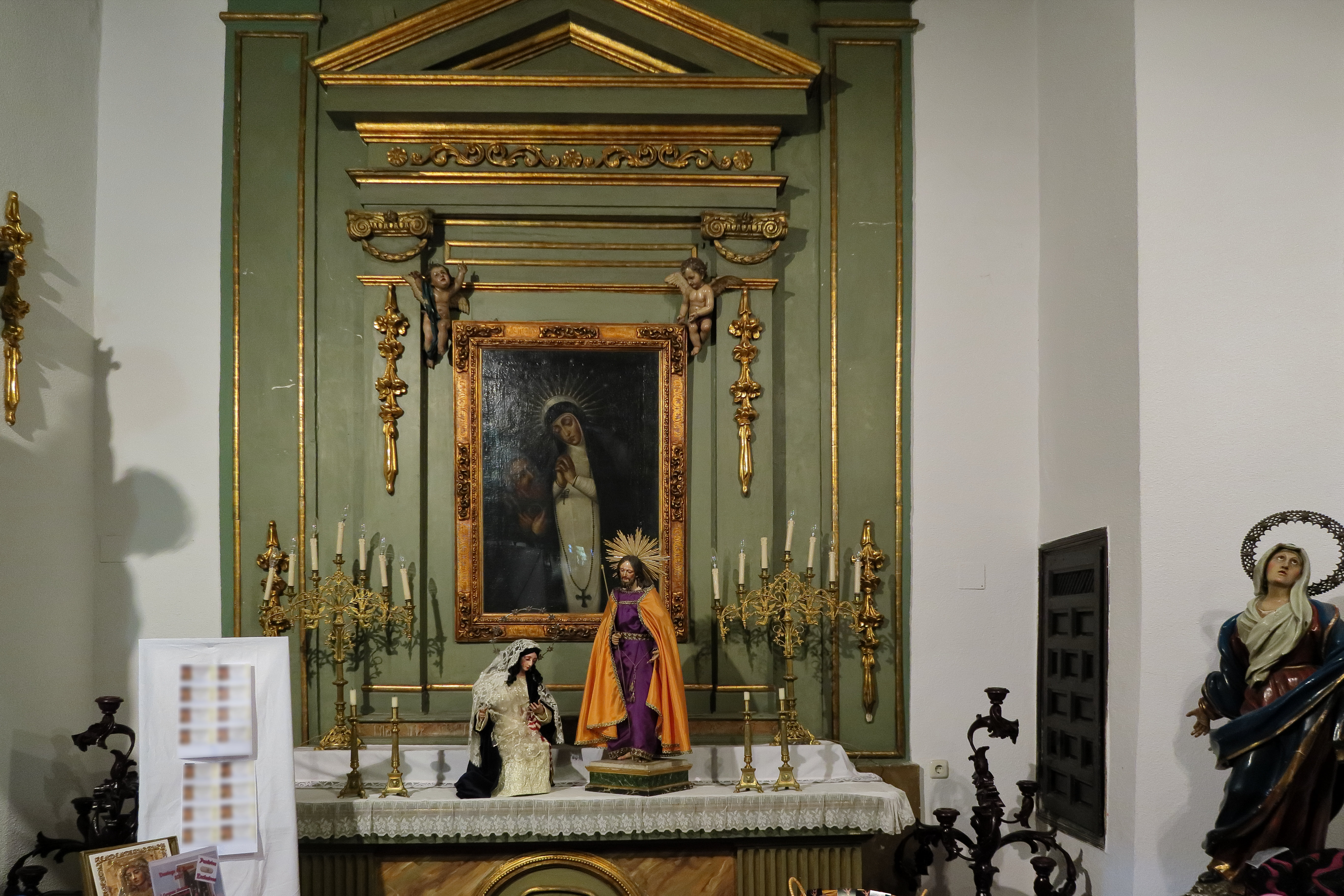 Humilladero de Fuencarral, interior, 02